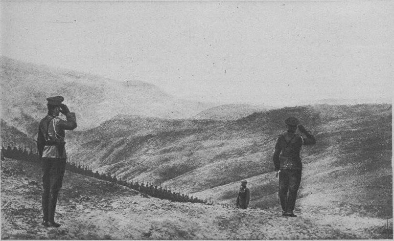 Photographie publiée par l'hebdomadaire Le Miroir le 1 juillet 1917 page 12.